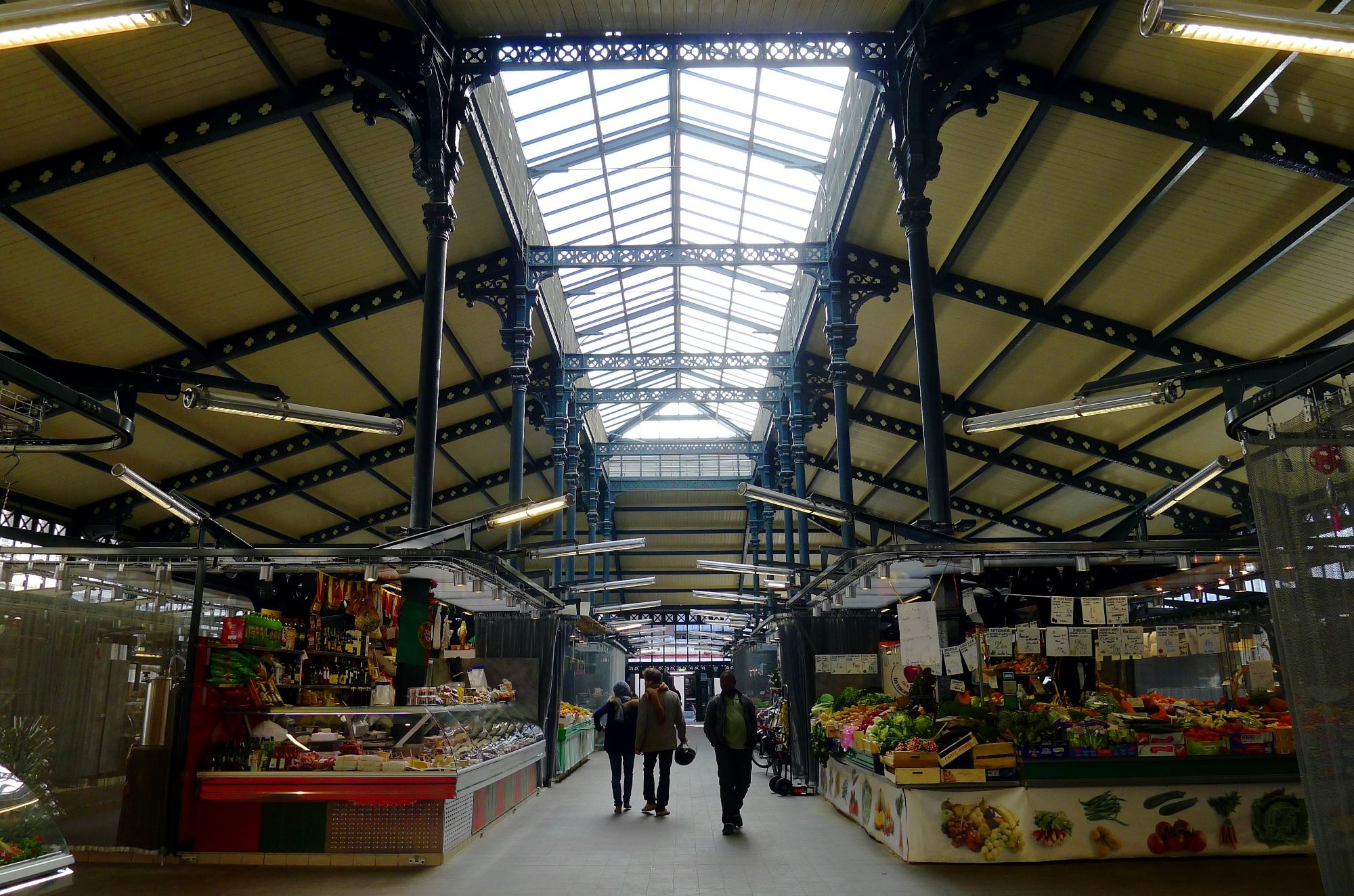 Marché couvert la Chapelle - Paris XVIII